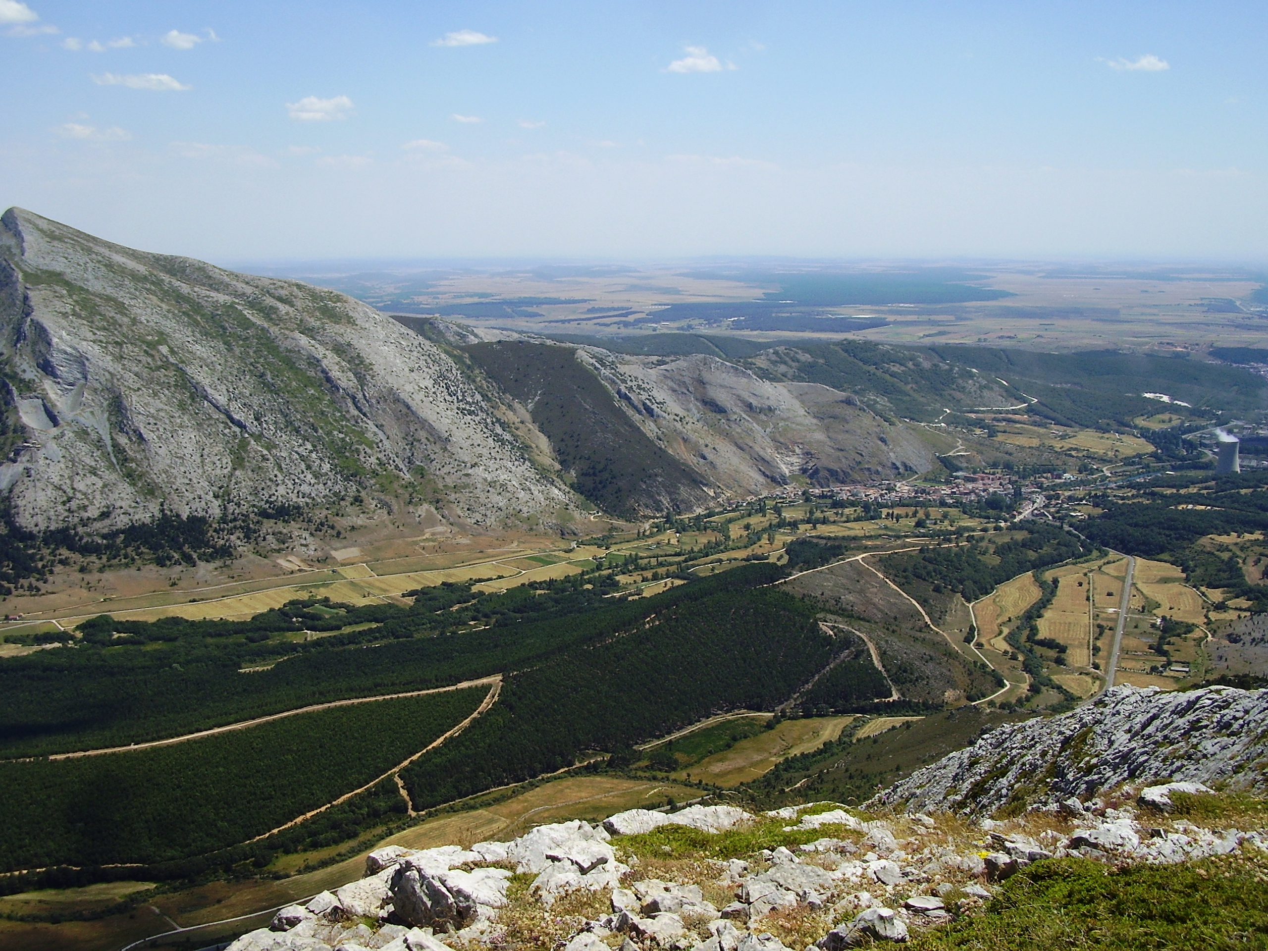 Vista de Velilla al fondo del valle del Río Carrión (Palencia, Castilla y León).